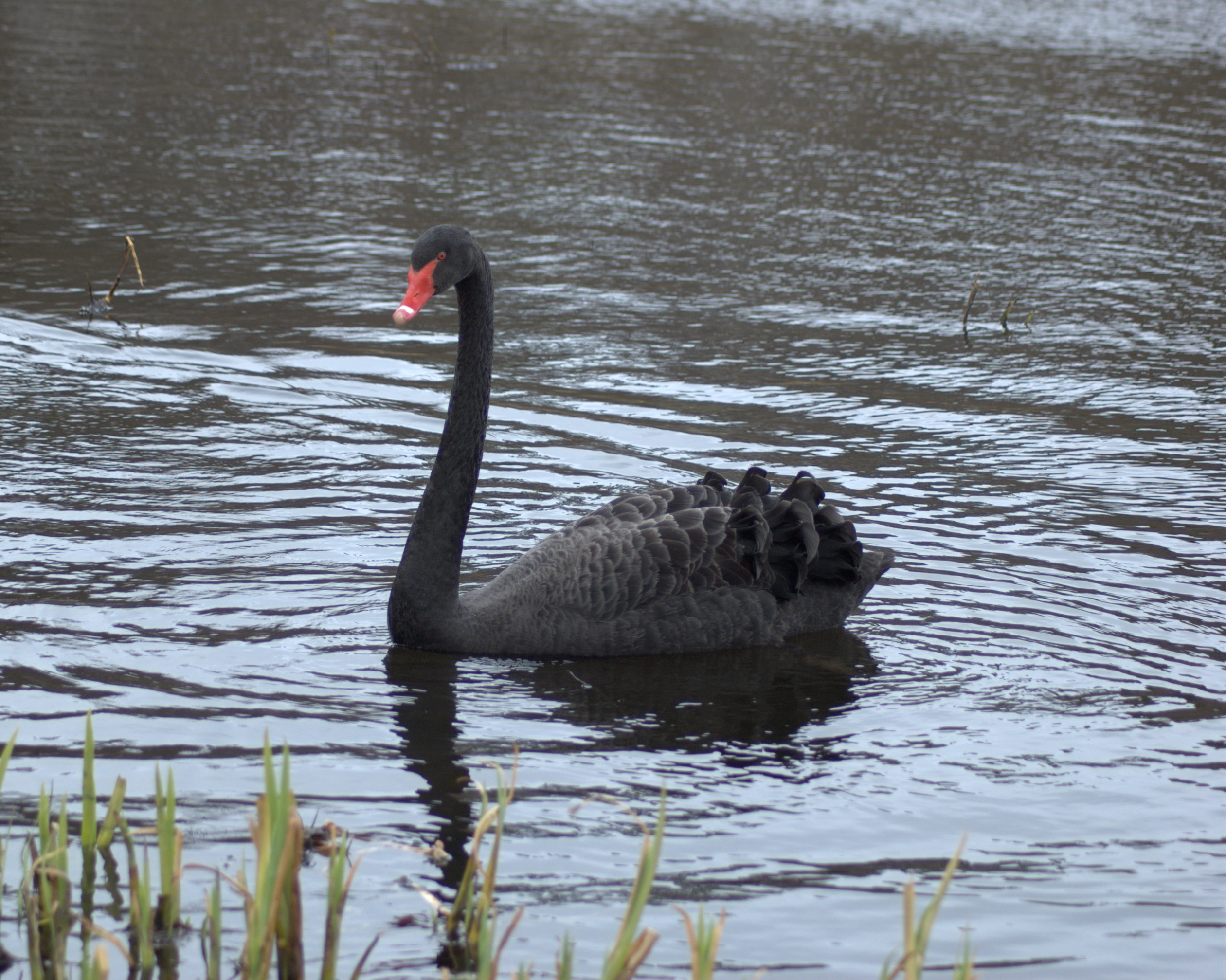 Bird of the species Cygnus atratus. en: The bird in this image is a Black Swan. sv: Fågeln på bilden är en svart svan. Camera: Nikon D50 Location: A pond in Ramnaparken in Borås, Sweden.